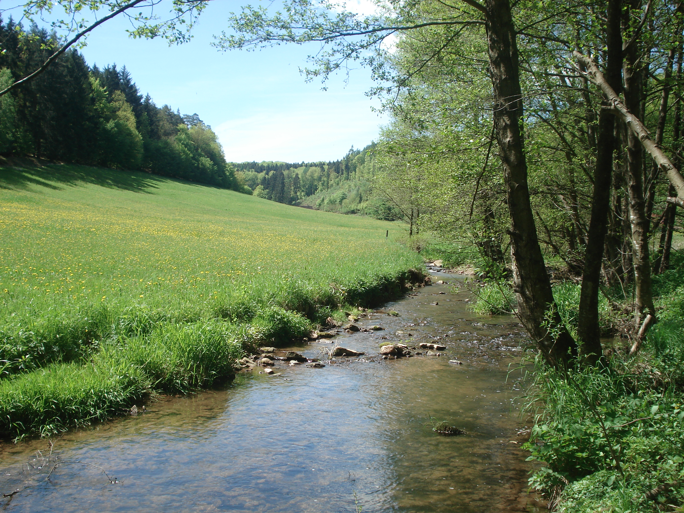 Der Wachenbach an der Alten Wachenmühle